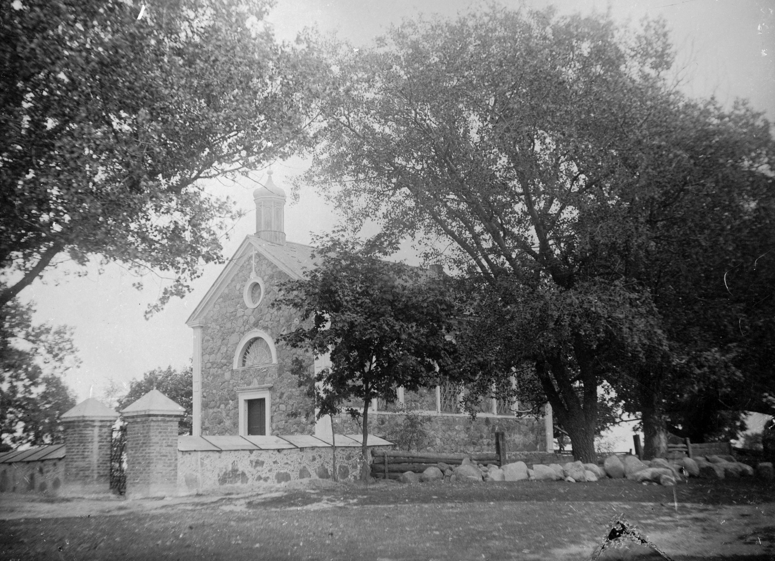 Беларуская (тарашкевіца): Беніца (Bienica), пляц Рынак (plac Rynak). Царква Покрыва Багародзіцы